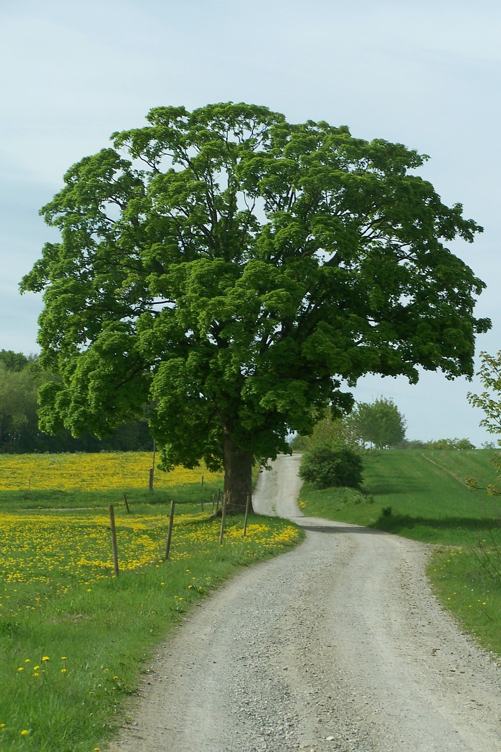 Ein Naturdenkmal in der Flur Kaltenlengsfeld. Der Ahorn steht am Wanderweg von Kaltenlengsfeld nach Kaltennordheim.